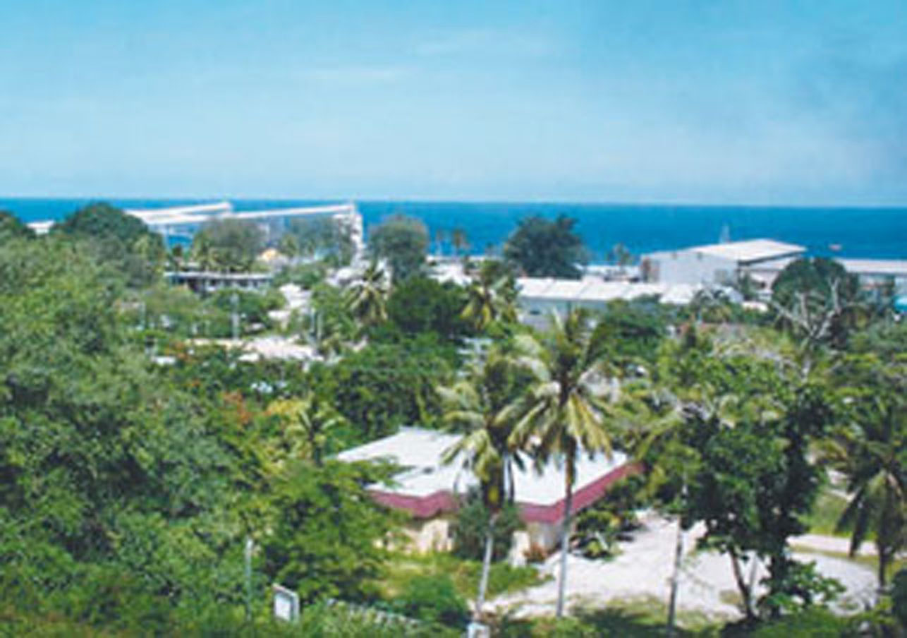 Aufnahme des Distrikts Aiwo mit Blick nach Westen.